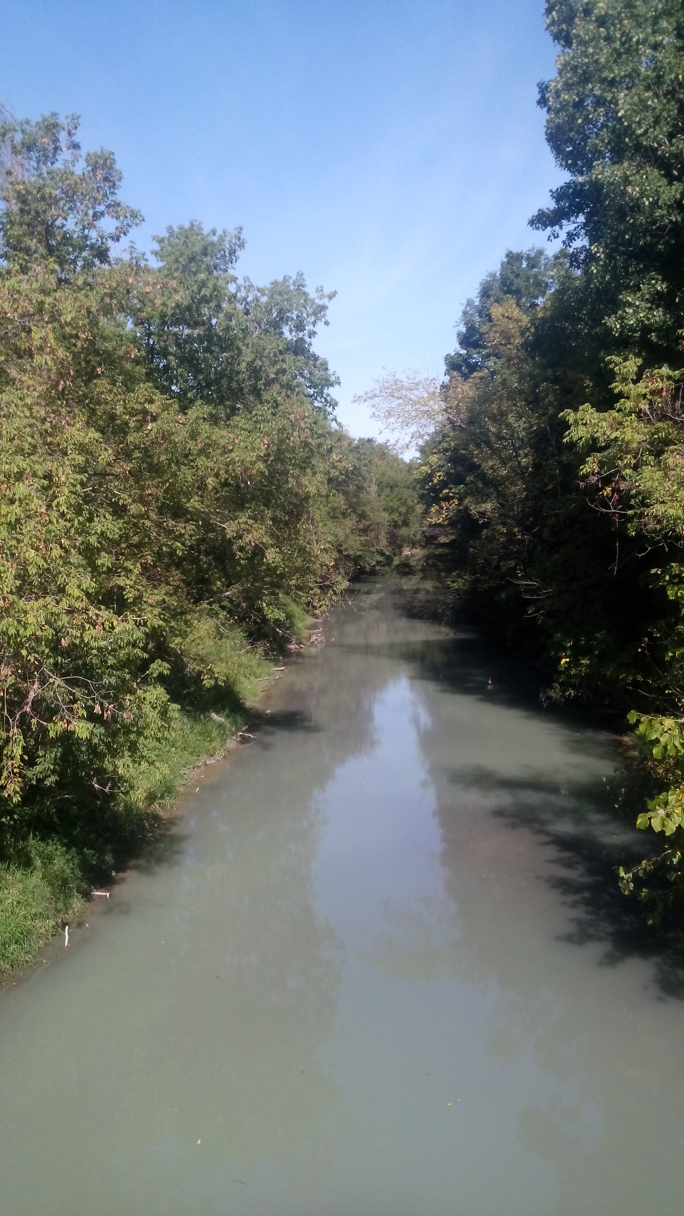 Rivière à la Rqauette, vue du pont du chemin Saint-Henri